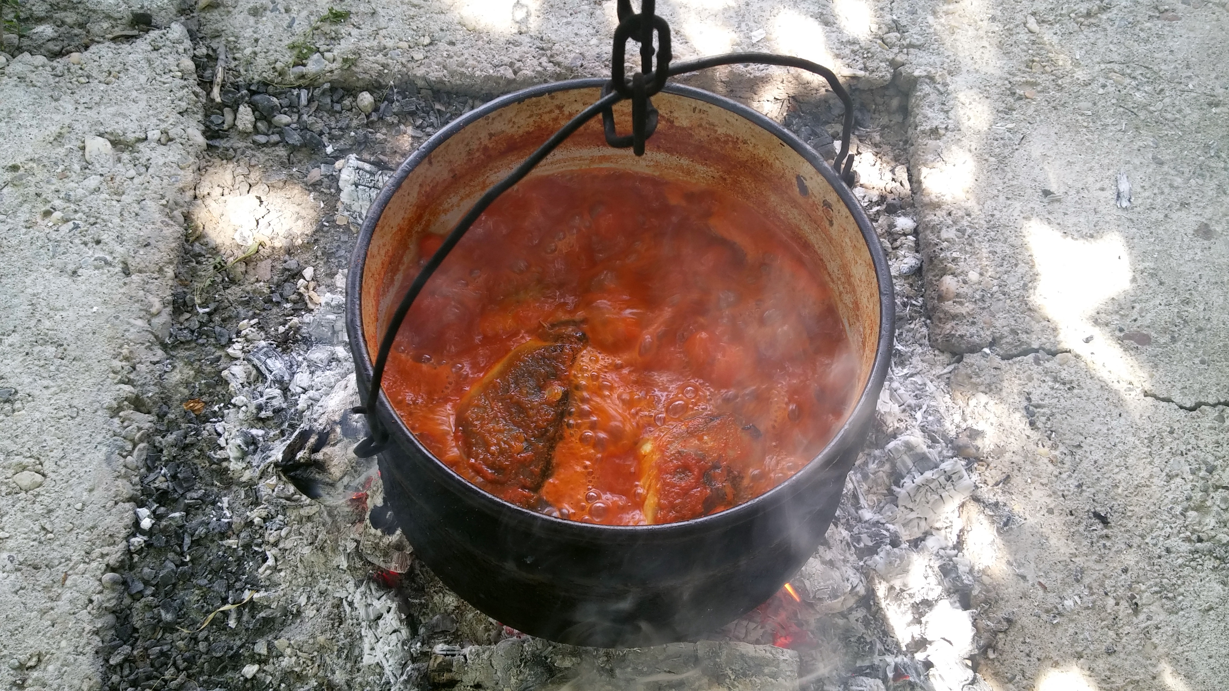 Рибљи паприкаш